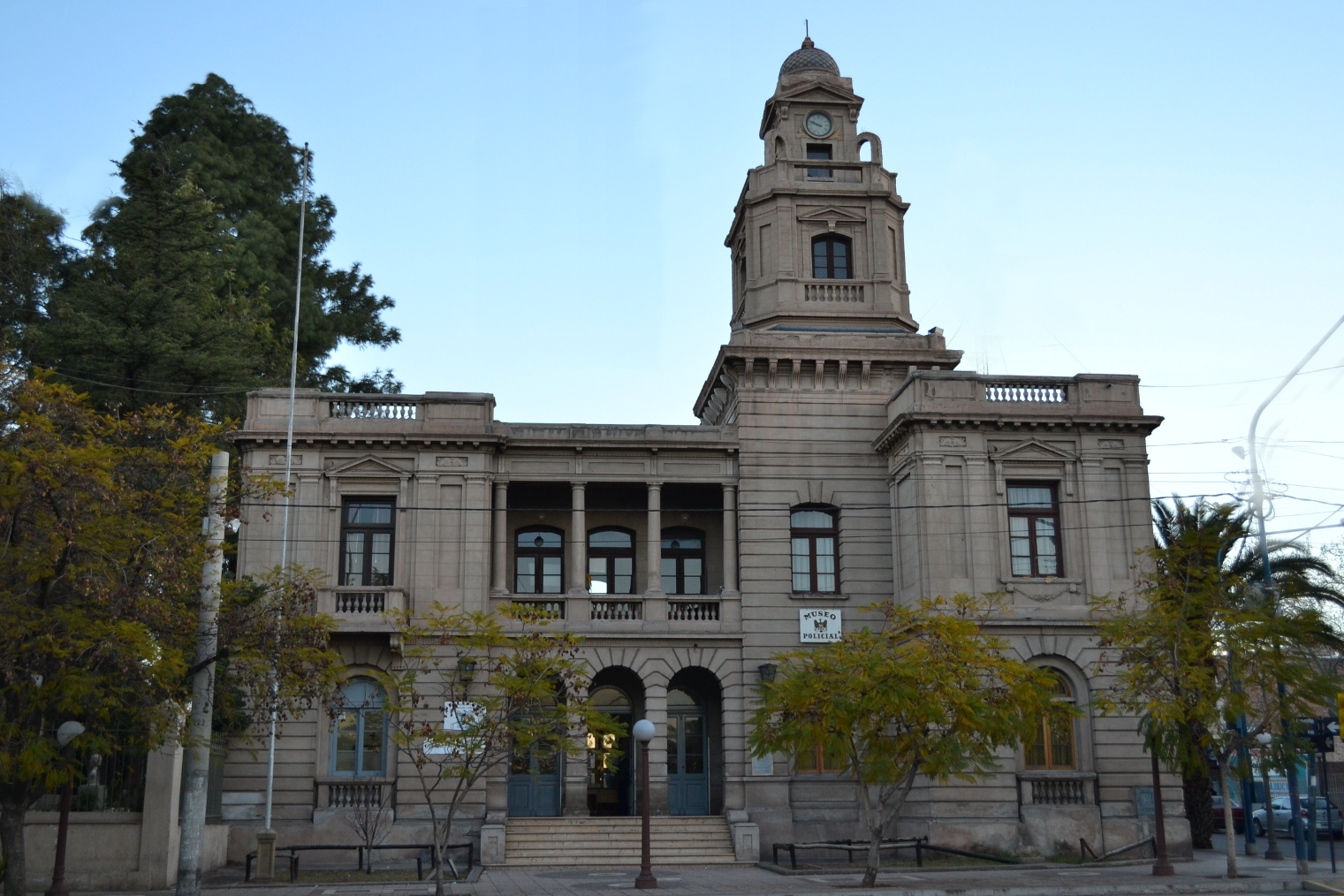 Edificio "Comisaría 7ma" de la Policía de Mendoza - Godoy Cruz. Calle Lavalle Nº 88. Monumento Histórico Provincial, ID M037. Credito: Sefer. Año 2012.